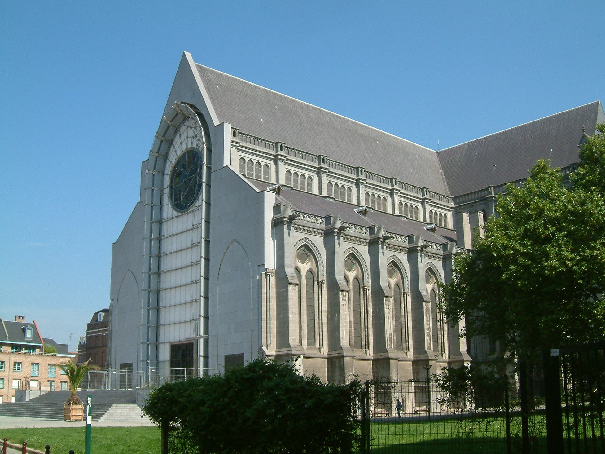 Cathédrale Notre-Dame-de-la-Treille de Lille, Lille, Nord, FRANCE